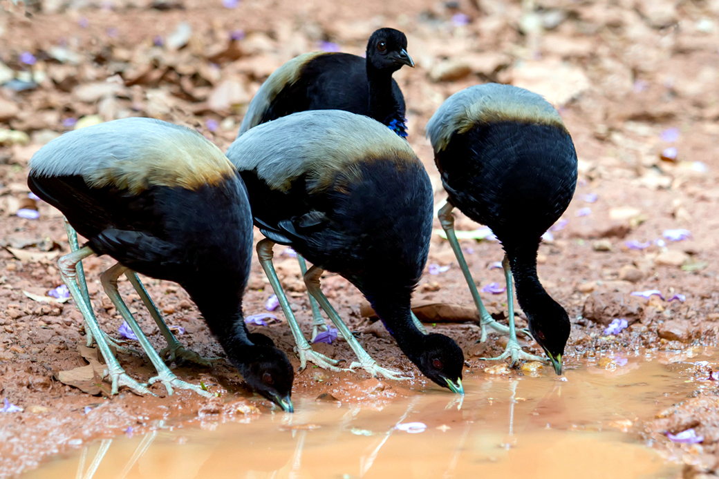 BIRD GREY WINGED TRUMPETER DRINKING SURINAM AMAZONE SOUTH-AMERICA